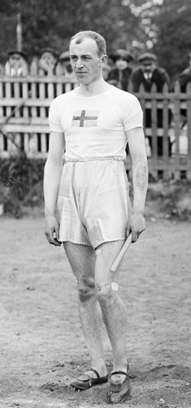 28-8-20, Colombes, départ du 400 m relais [4x400 m], Sven Krokström: [photographie de presse] / [Agence Rol]